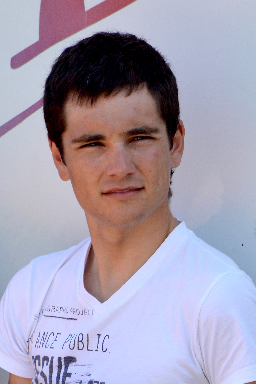 Igor Merino Cortazar